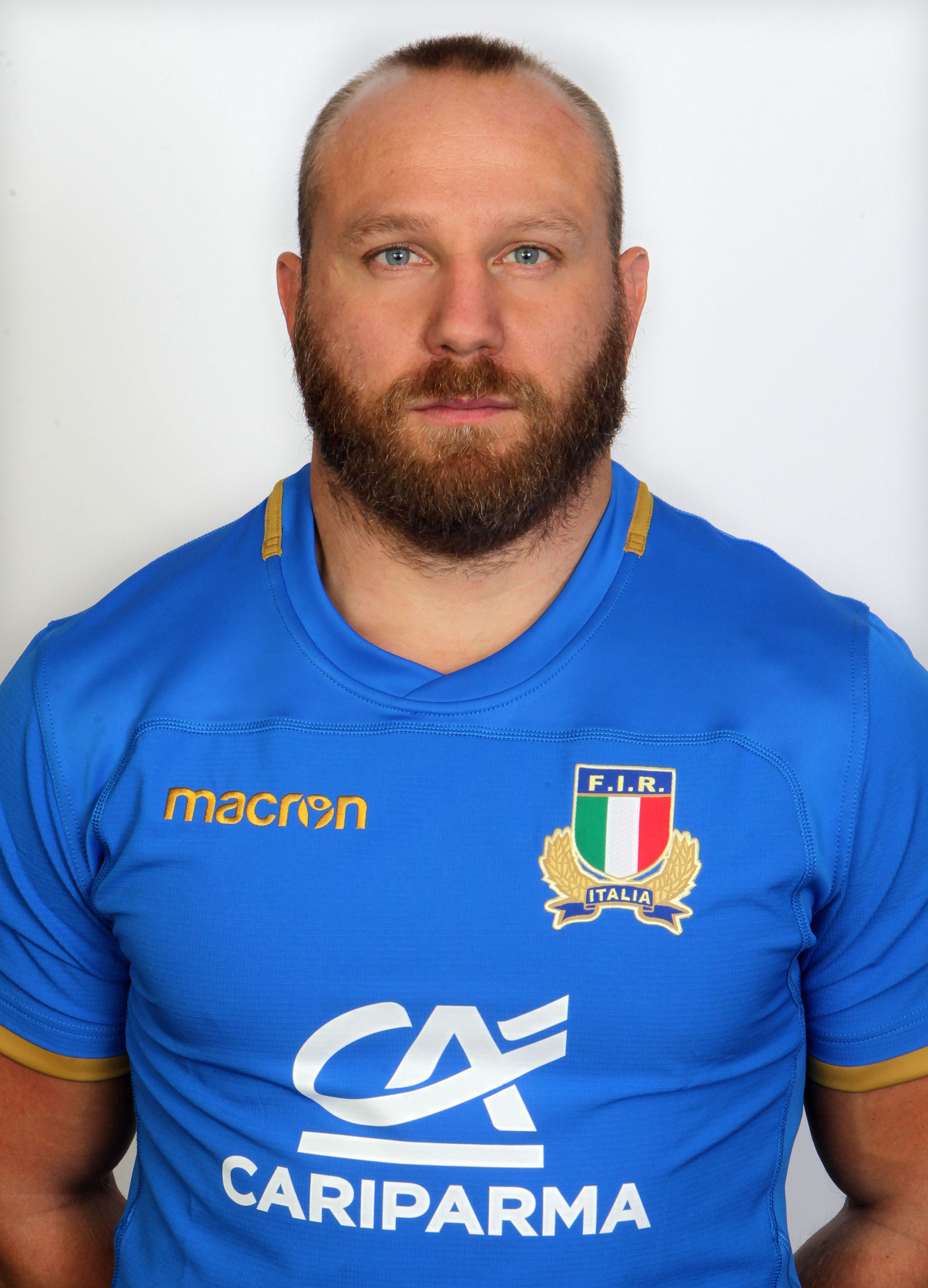 Cariparma Test match 2017, Parma 22/10/2017, raduno Nazionale italiana, profili individuali di atleti e staff, Leonardo GHIRALDINI, tallonatore (Stade Toulousain, 86 caps)